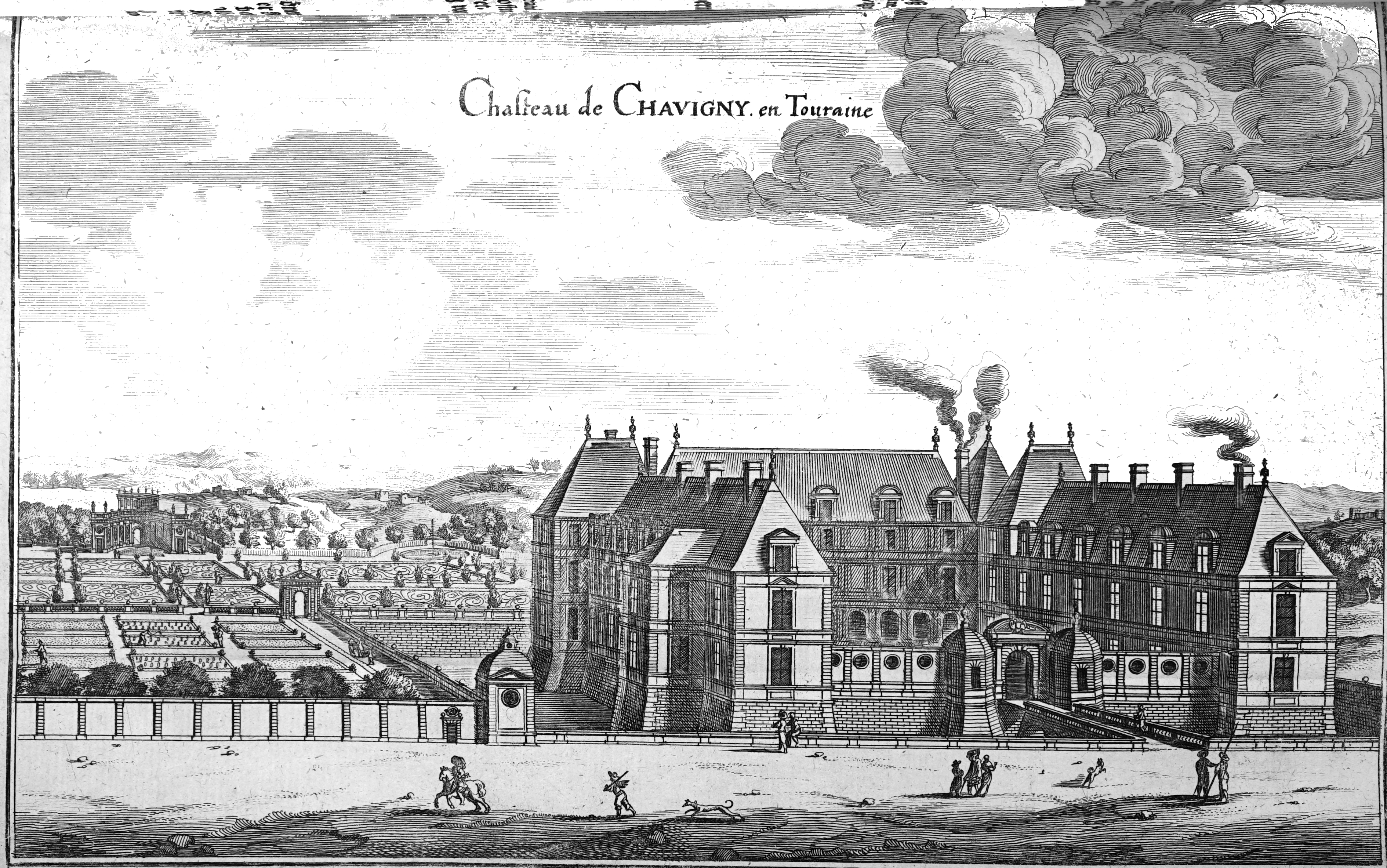 dessin de Topographiae Galliae.